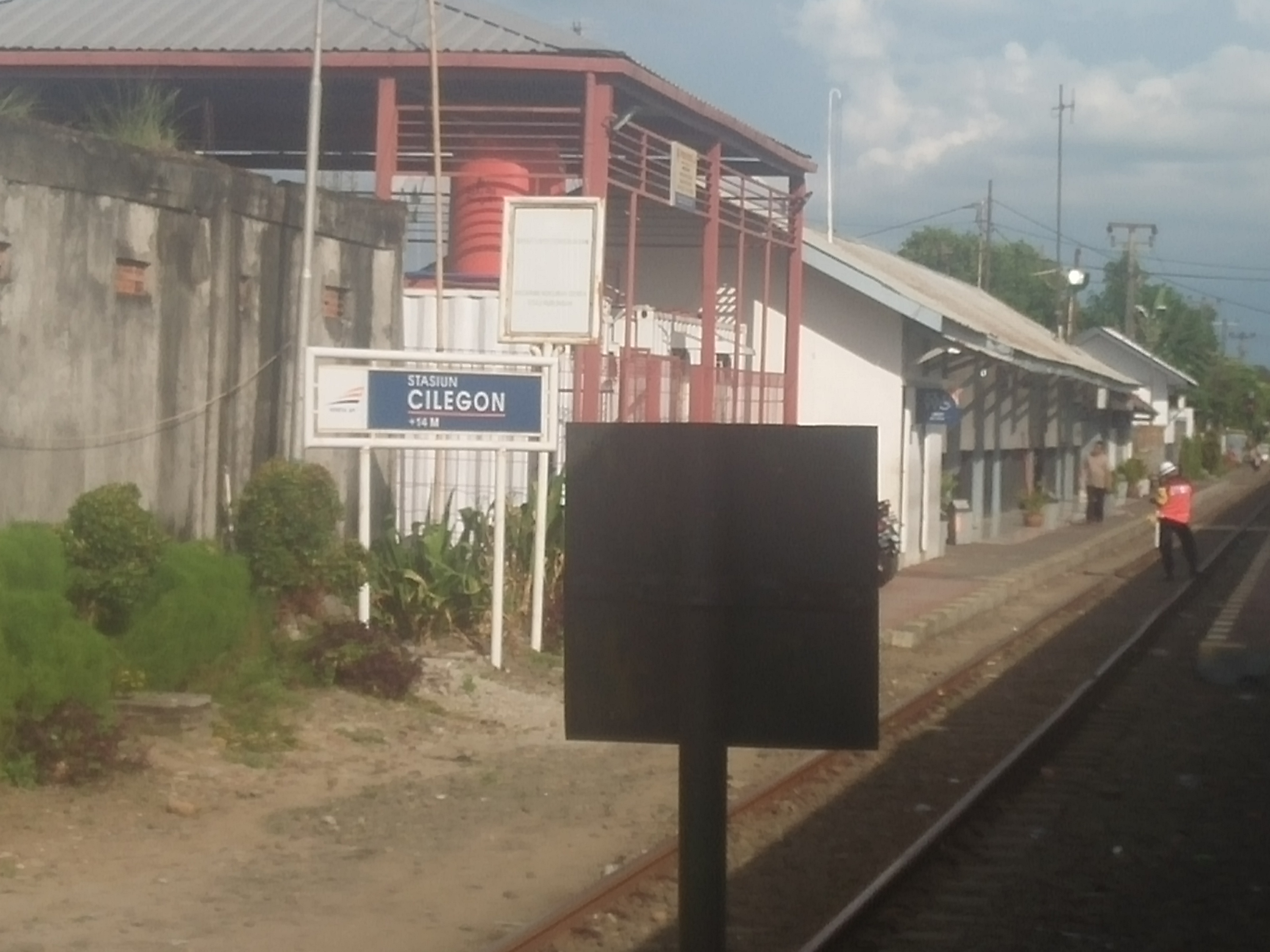 Stasiun Cilegon dari sisi pihak Merak